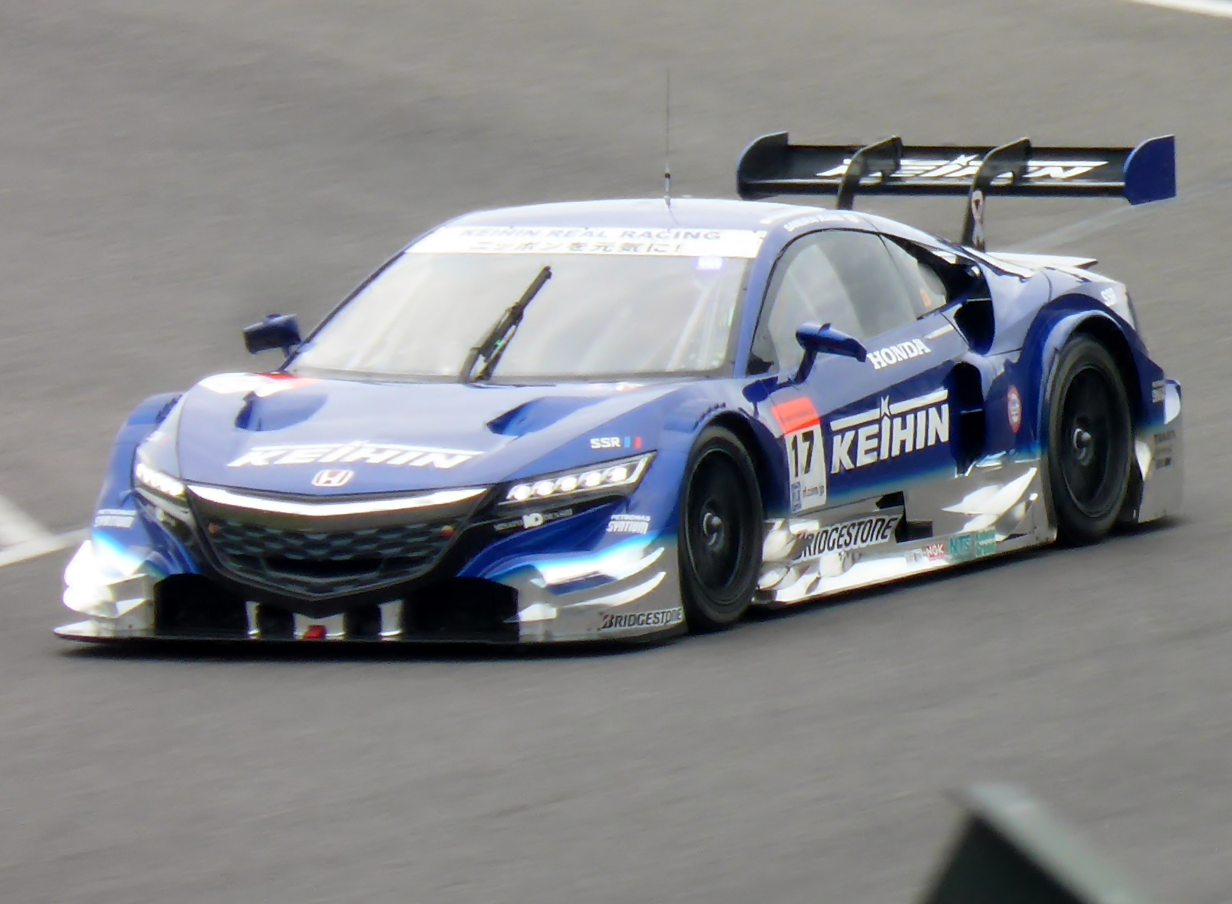 2014年鈴鹿テストにおいて17号車KEIHIN NSX CONCEPT-GTを撮影。